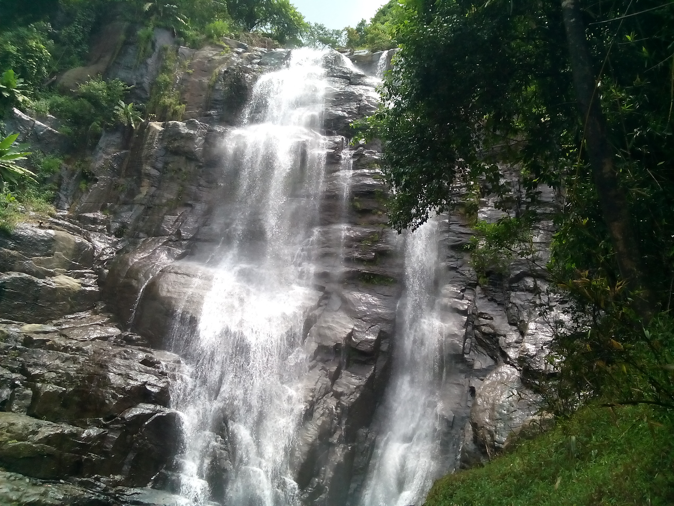 അരുവിക്കച്ചാൽ വെള്ളച്ചാട്ടം